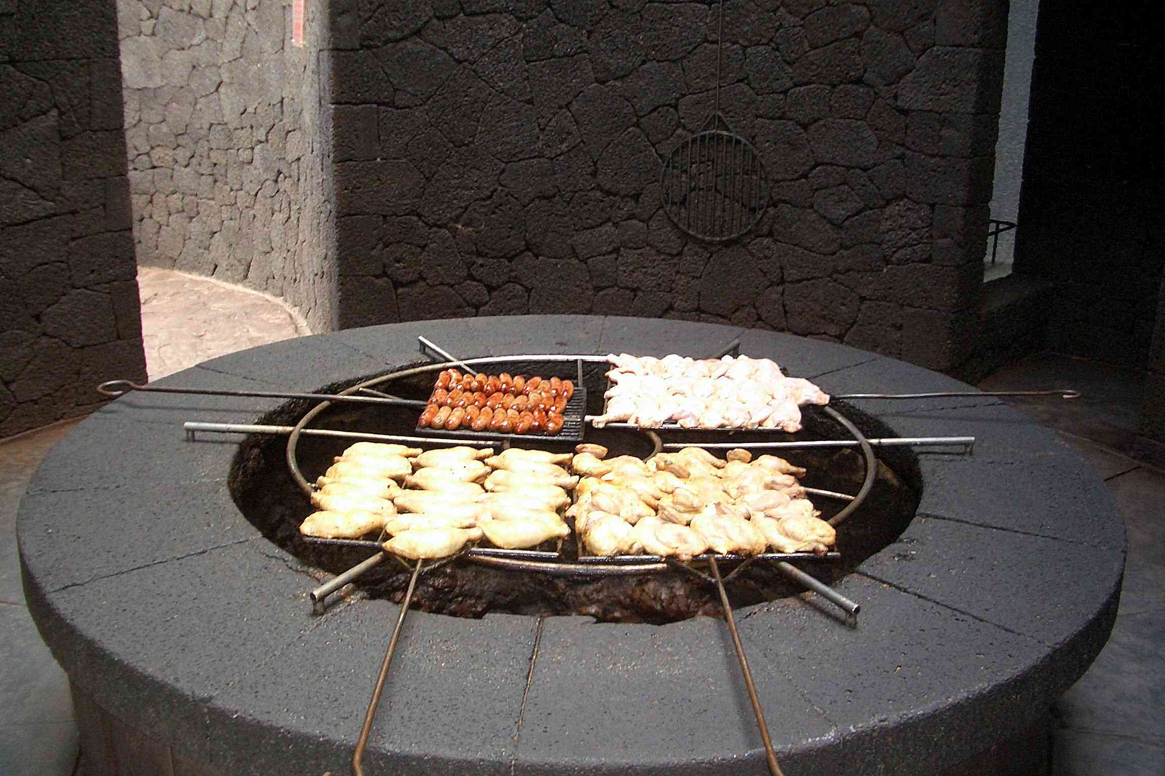 Grill im Timanfaya-Touristcenter beheizt mit der Hitze des Vulkans